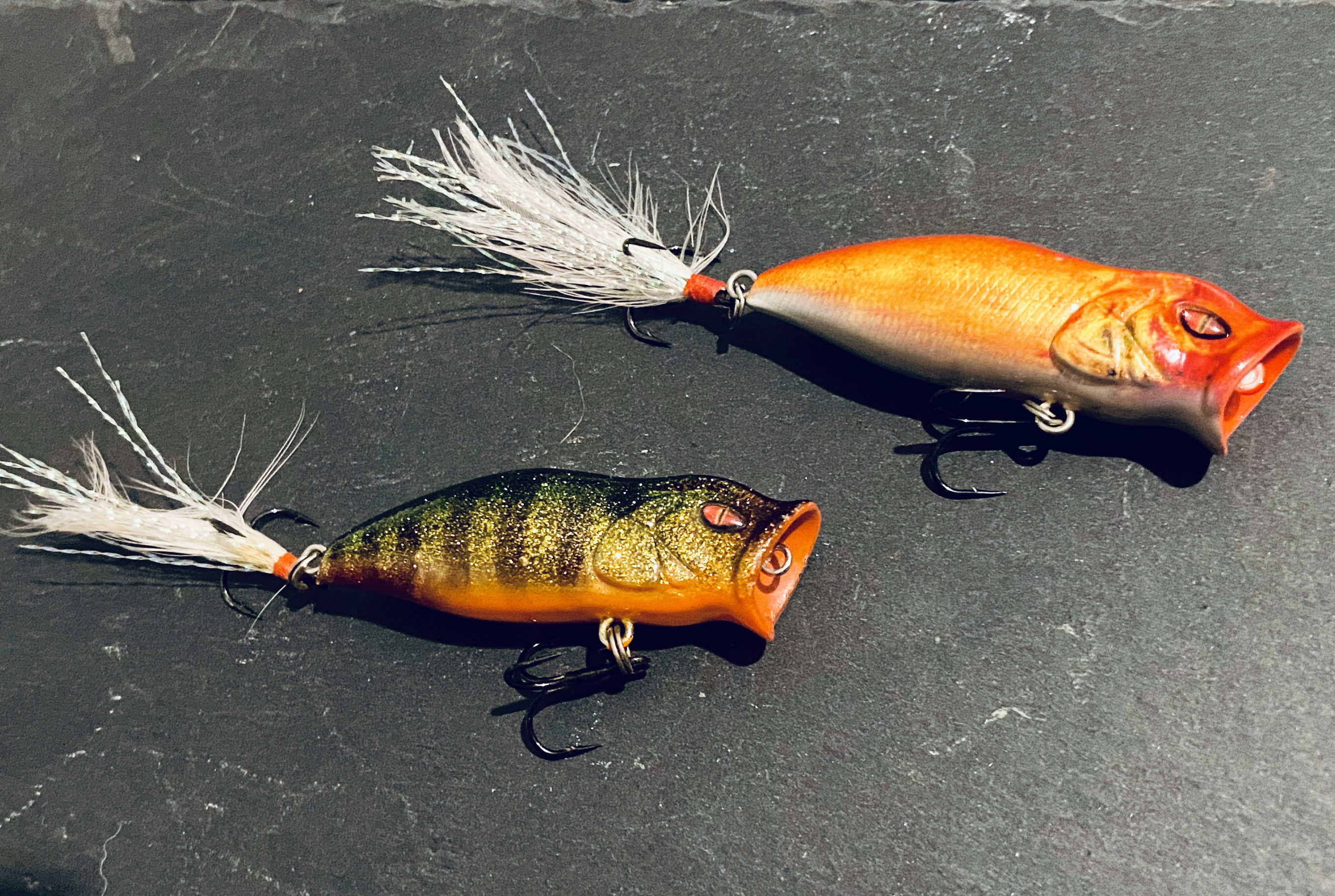 Verschiedene Popper zum Angeln